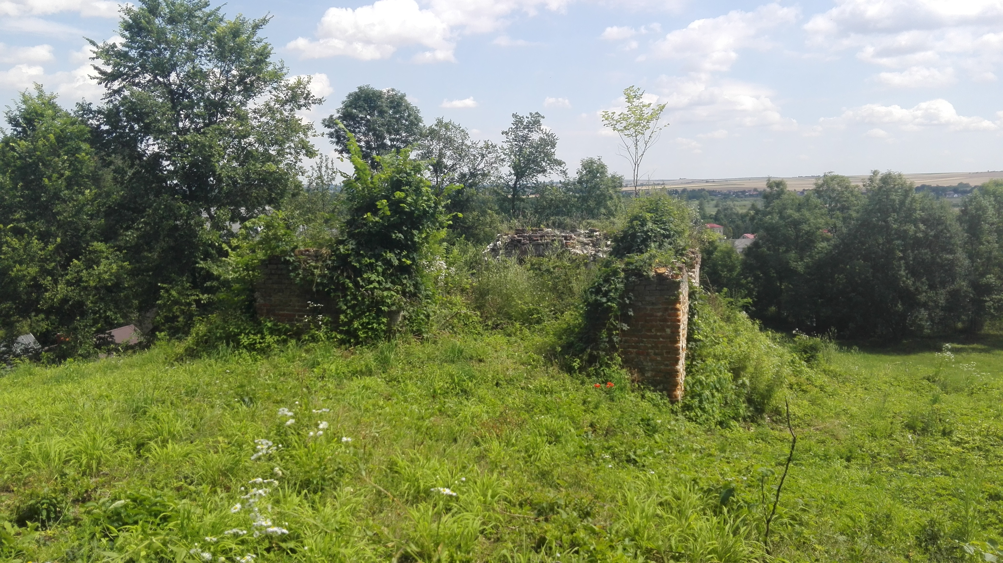 Ruiny wieży zamkowej z 2 połowy XIV wieku, przebudowanej w XVI wieku.